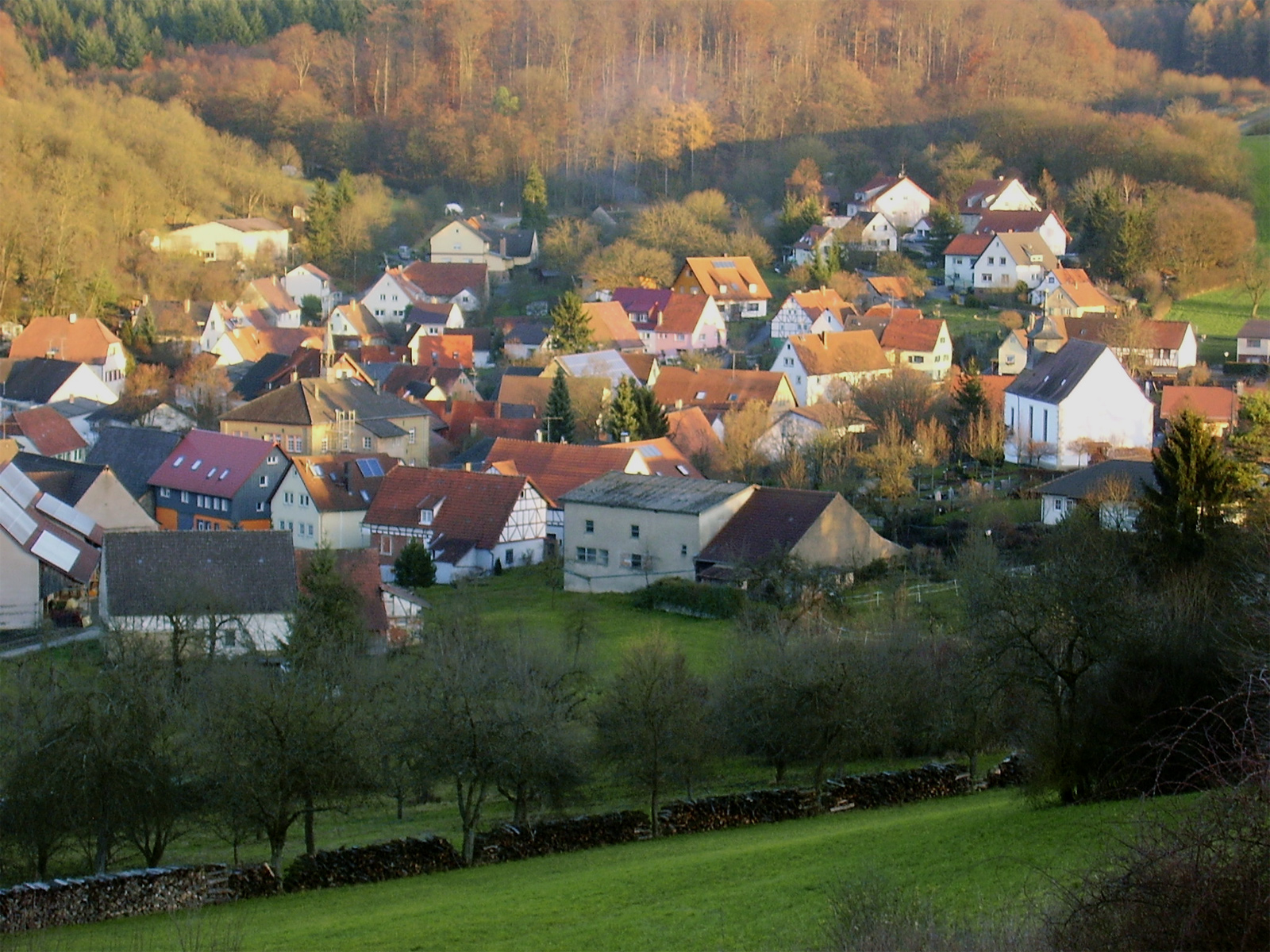 Korb bei Möckmühl, Blick Richtung ONO